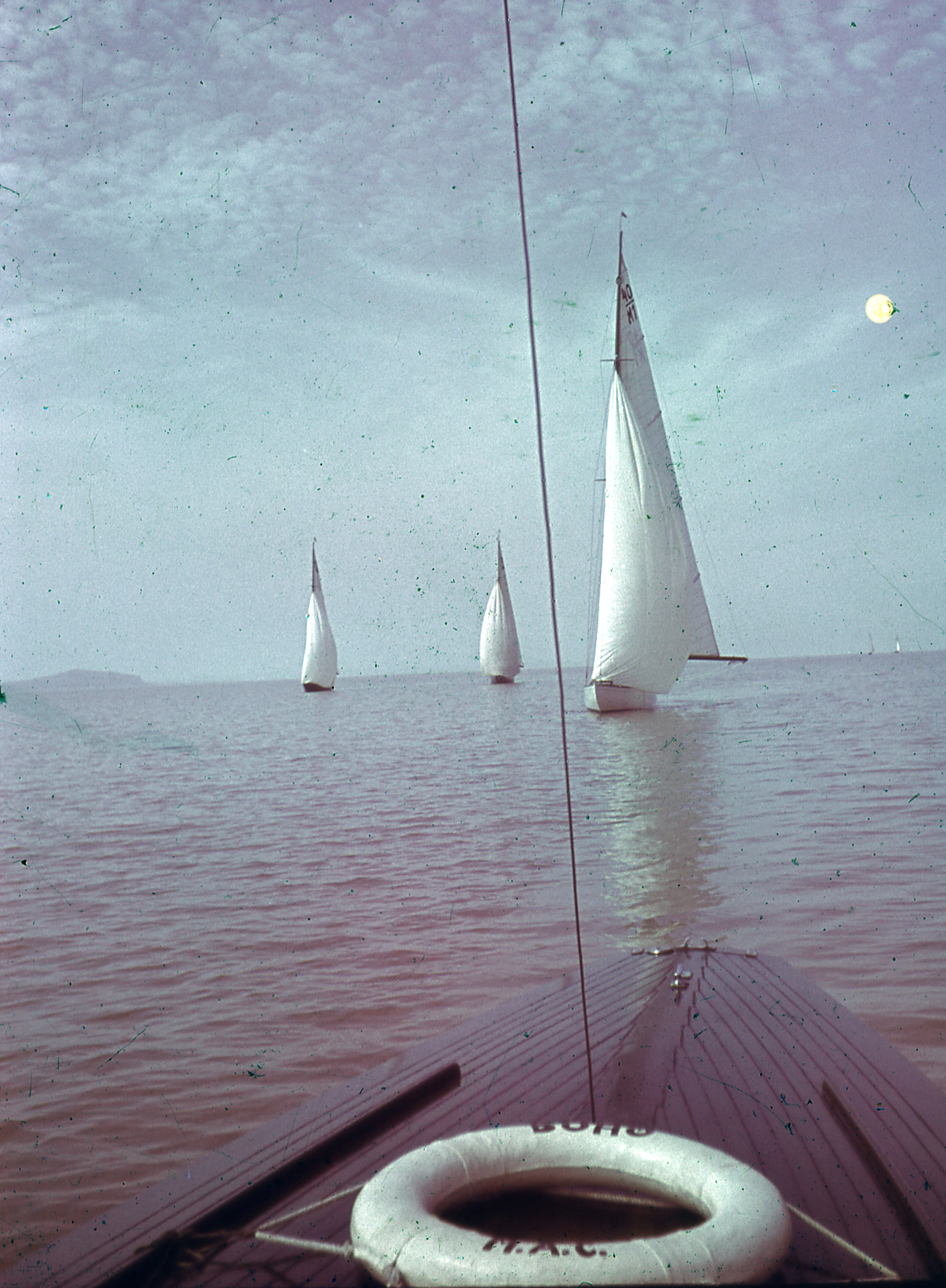 vitorlásverseny egy 30-as cirkálóról nézve. Location: Hungary, Lake Balaton Tags: colorful Title: vitorlásverseny egy 30-as cirkálóról nézve.